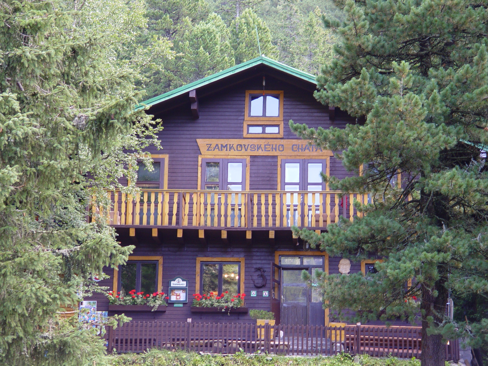 Magas-Tátra_Zamkovsky_menedékház